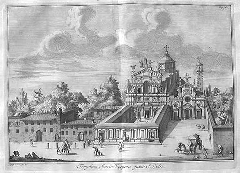 Santa Maria dei Miracoli a Milano e San Celso, nel 1704, in un'incisione di Giovanni Cristostomo Zanchi.